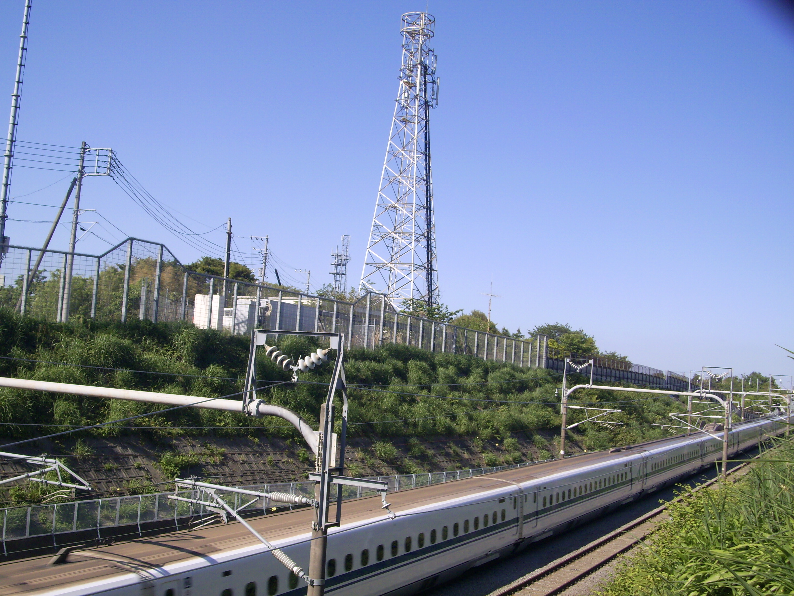 東海道新幹線鴨宮モデル線に伴い設置された鉄道無線基地（藤沢市用田）、開業後は中継所となった ㊟カメラを起動すると日付機能が出荷時のものに初期化されるため、ファイル履歴の撮影日時とメタデータの原画像データの生成日時が異なります